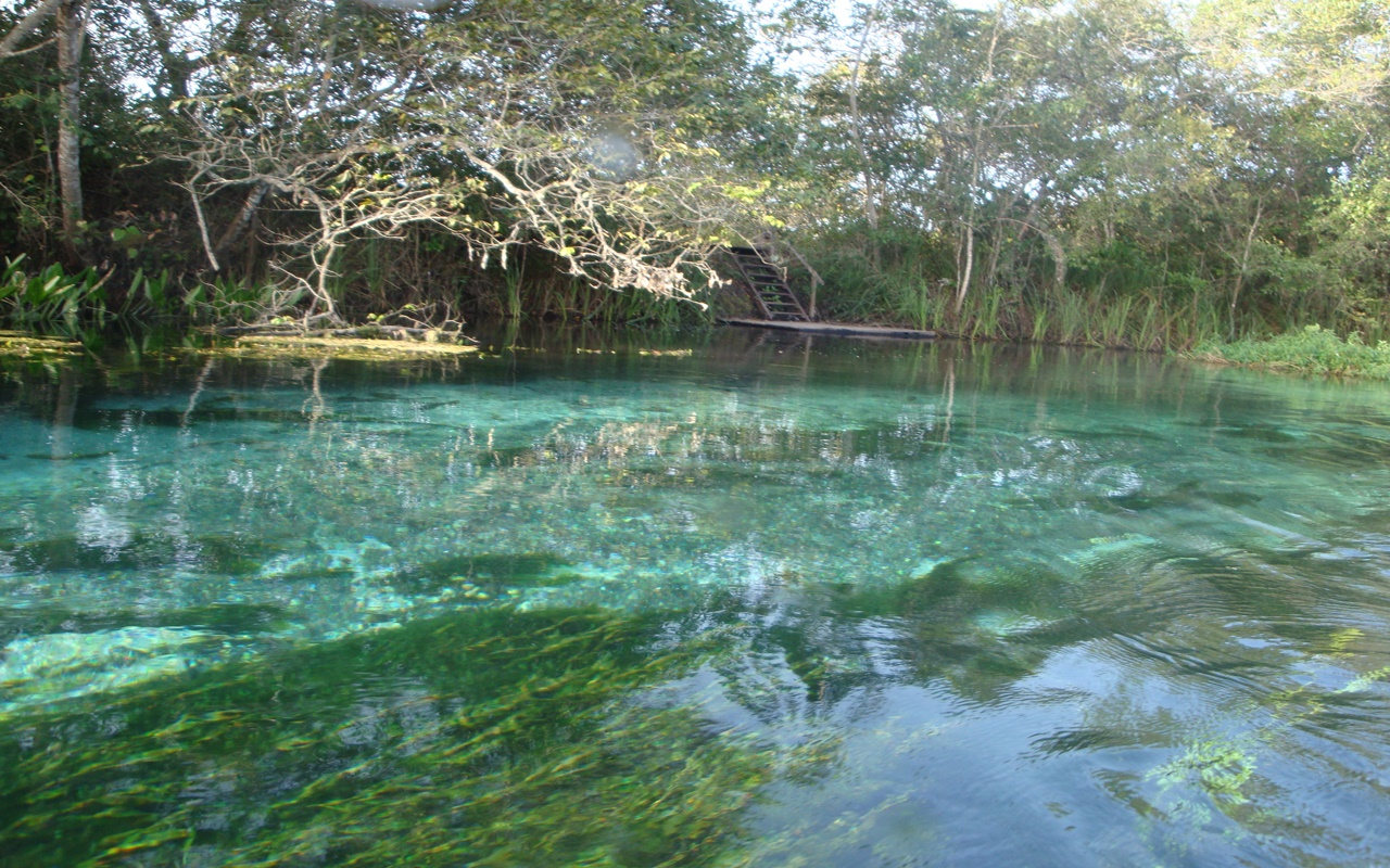 Descrição_para_sua_foto